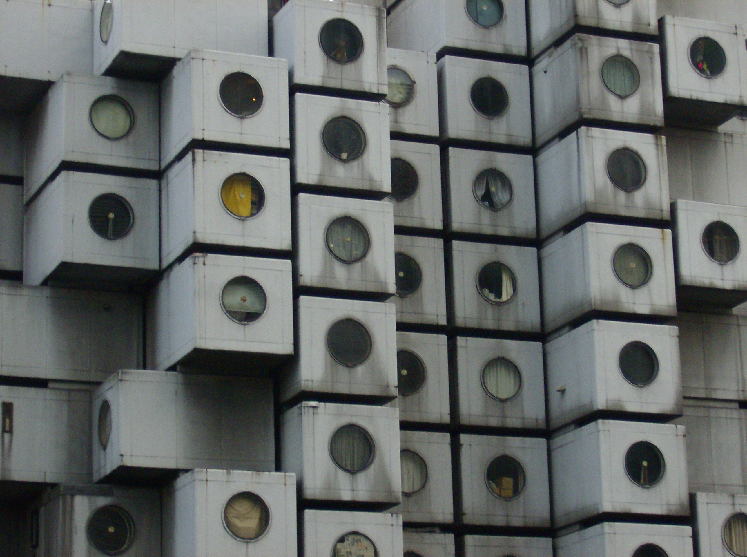 CAPSULE HOTEL, TOKYO